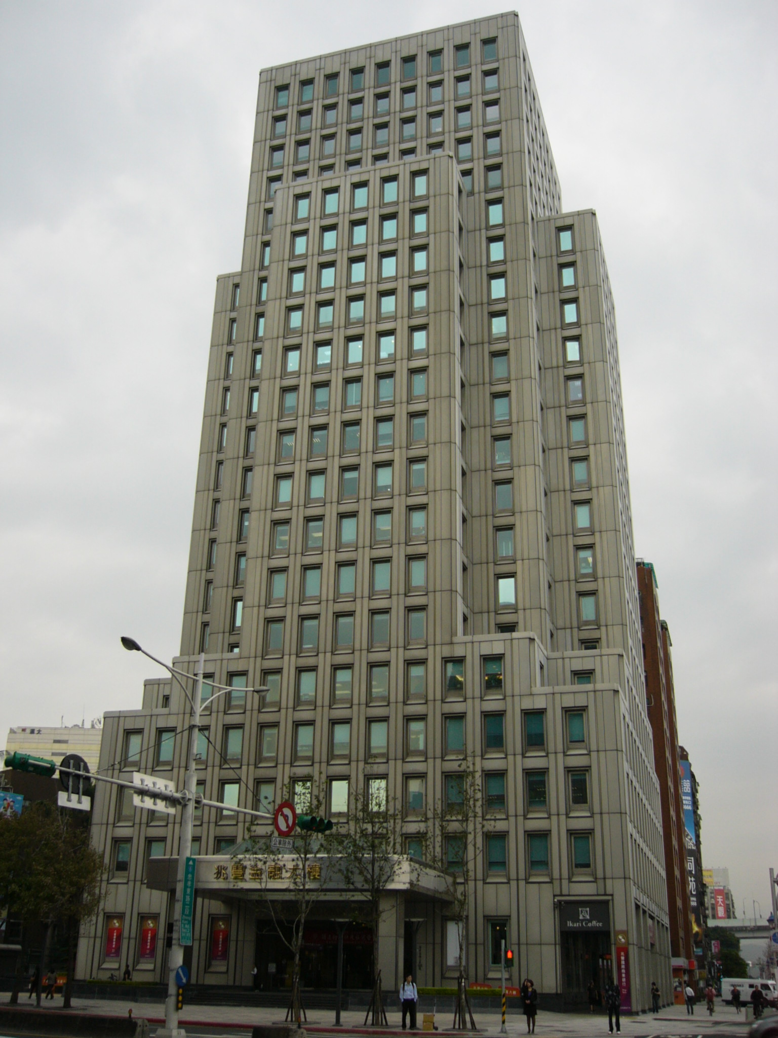 兆豐金融大樓，位於臺北市中正區忠孝東路二段123號。原中興紡織大樓，1998年售予交通銀行（今兆豐國際商業銀行）。